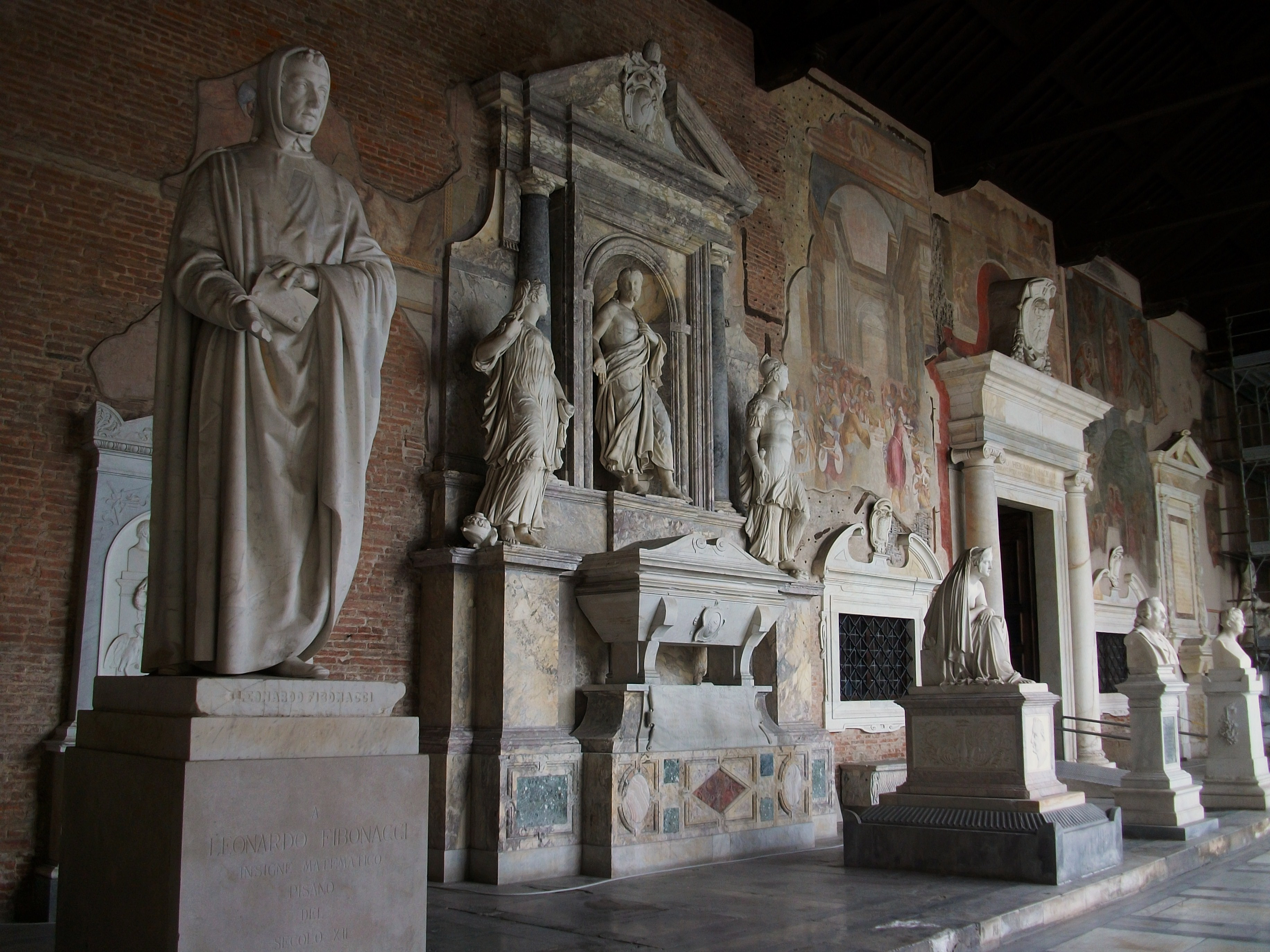 Monuments fúnebres al Camposanto de Pisa.